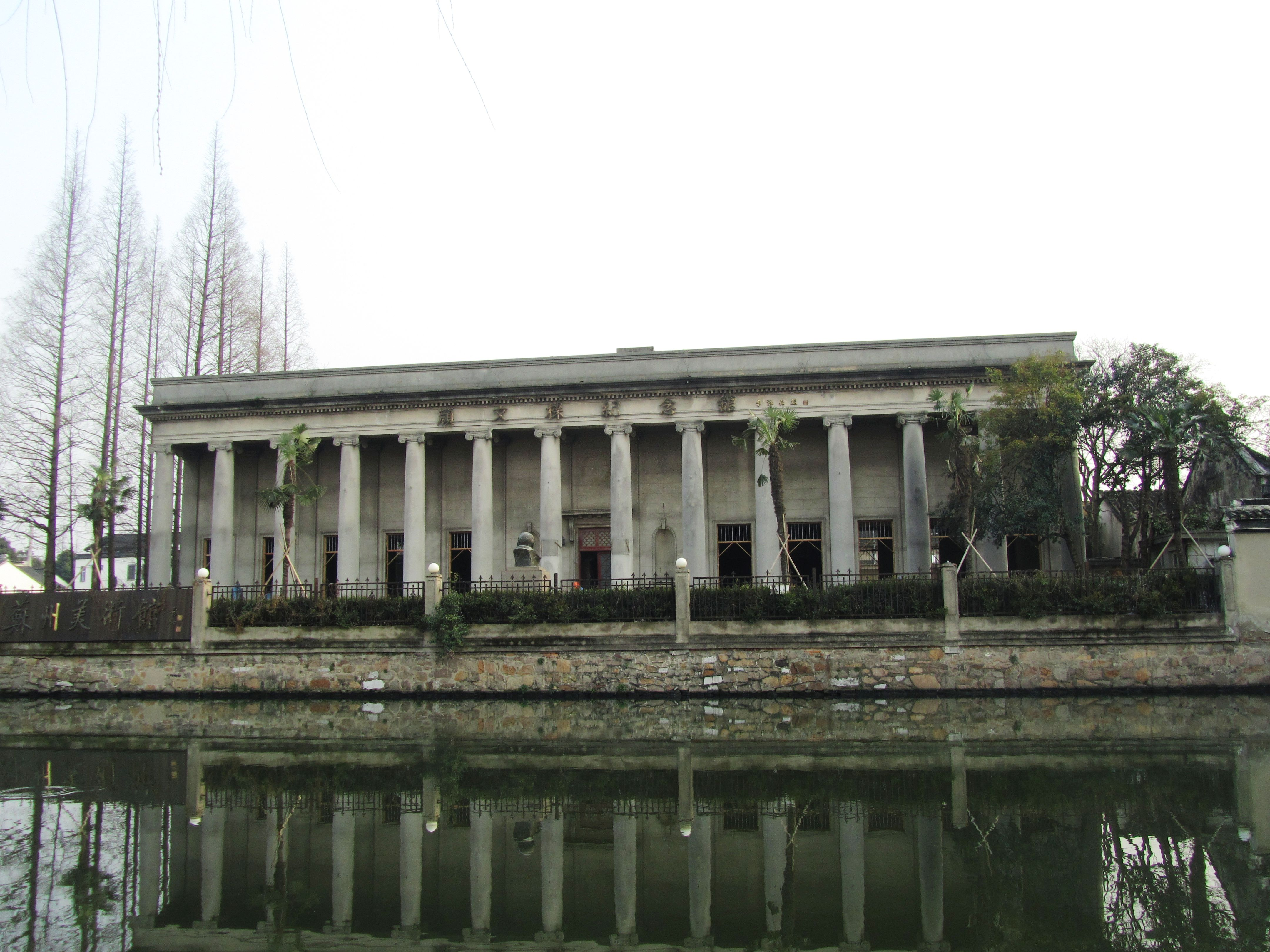 苏州颜文樑纪念馆，原苏州美术专科学校旧址。